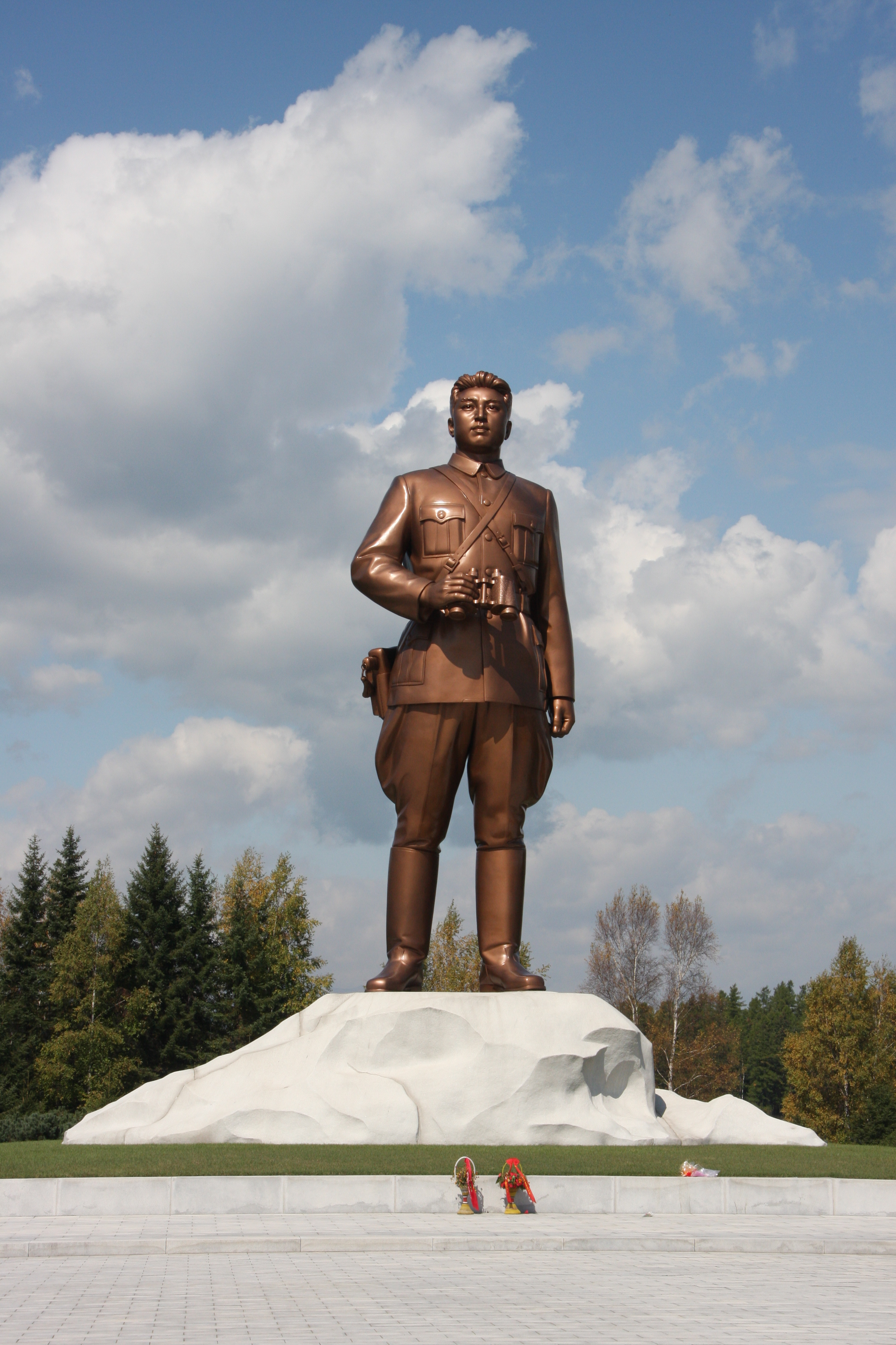 Kim Il-Sung statue at Samjiyon Grand Monument